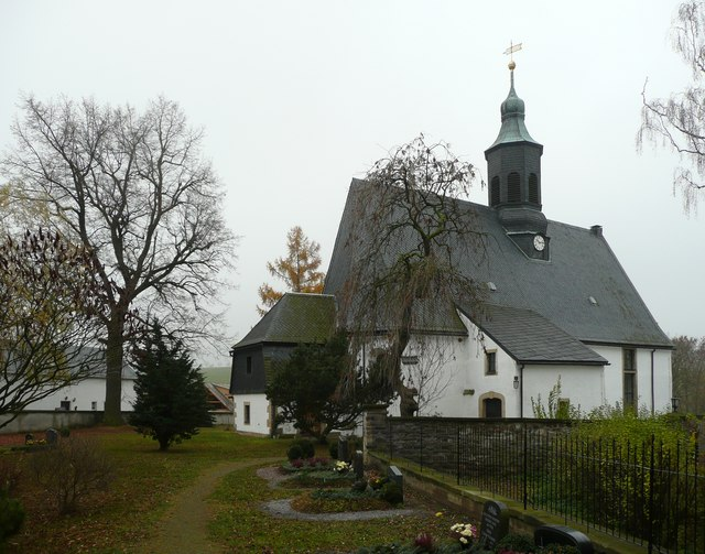 Liebenau (Geising): Blick auf die Dorfkirche